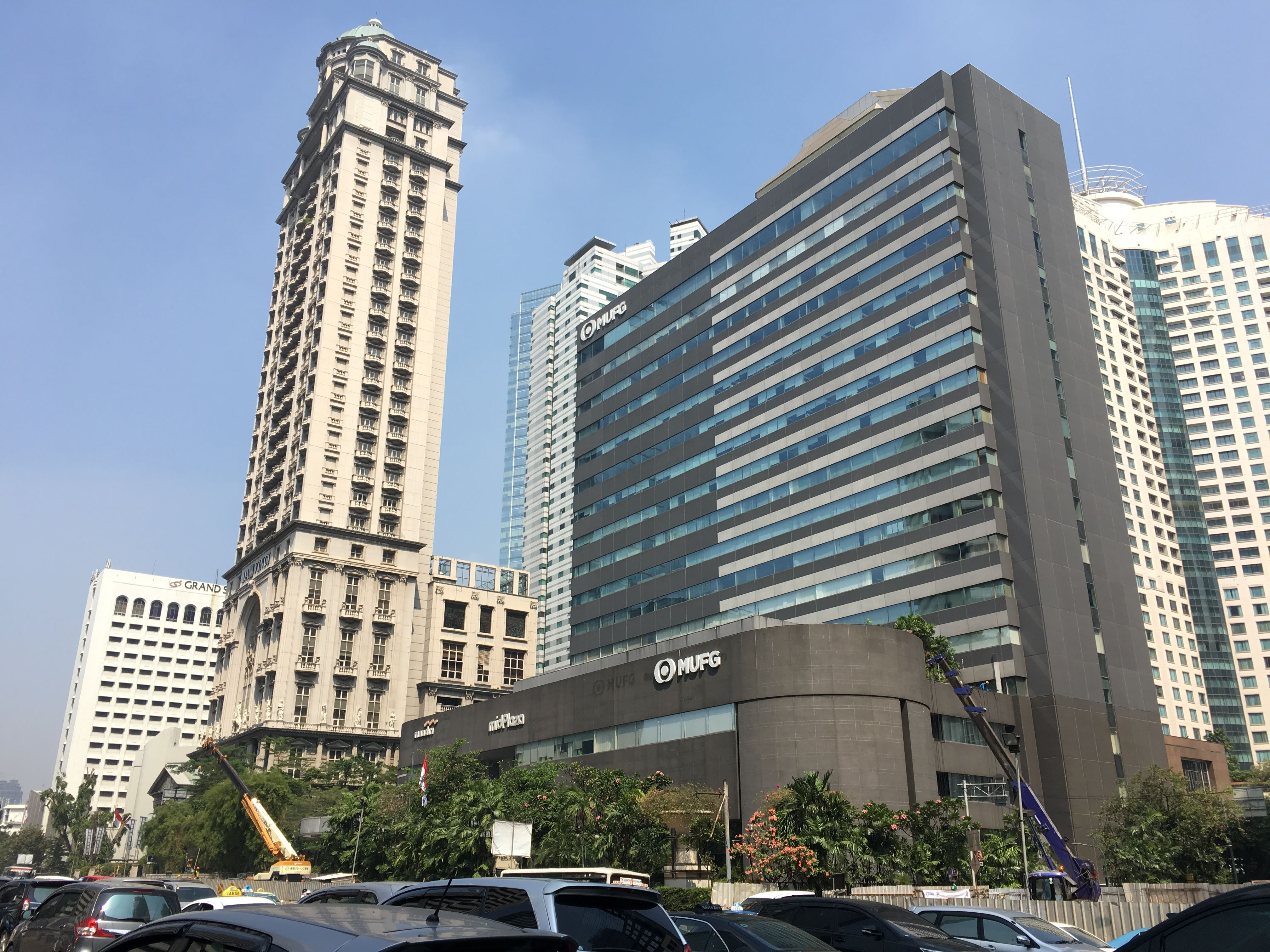 Gedung Midplaza, diambil dari sisi Midplaza 1 (Jalan Jenderal Sudirman).